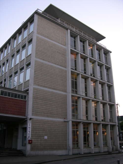 Block A des ehemaligen Berufsbildungszentrums Bremen, Nordost-Ansicht; Architekt: Baurat Dr.-Ing. Hans Krajewski, 1952-1954; Standort: ex Berufsbildungszentrum Bremen, Block A, An der Weserbahn/Doventorscontrescape, Bremen